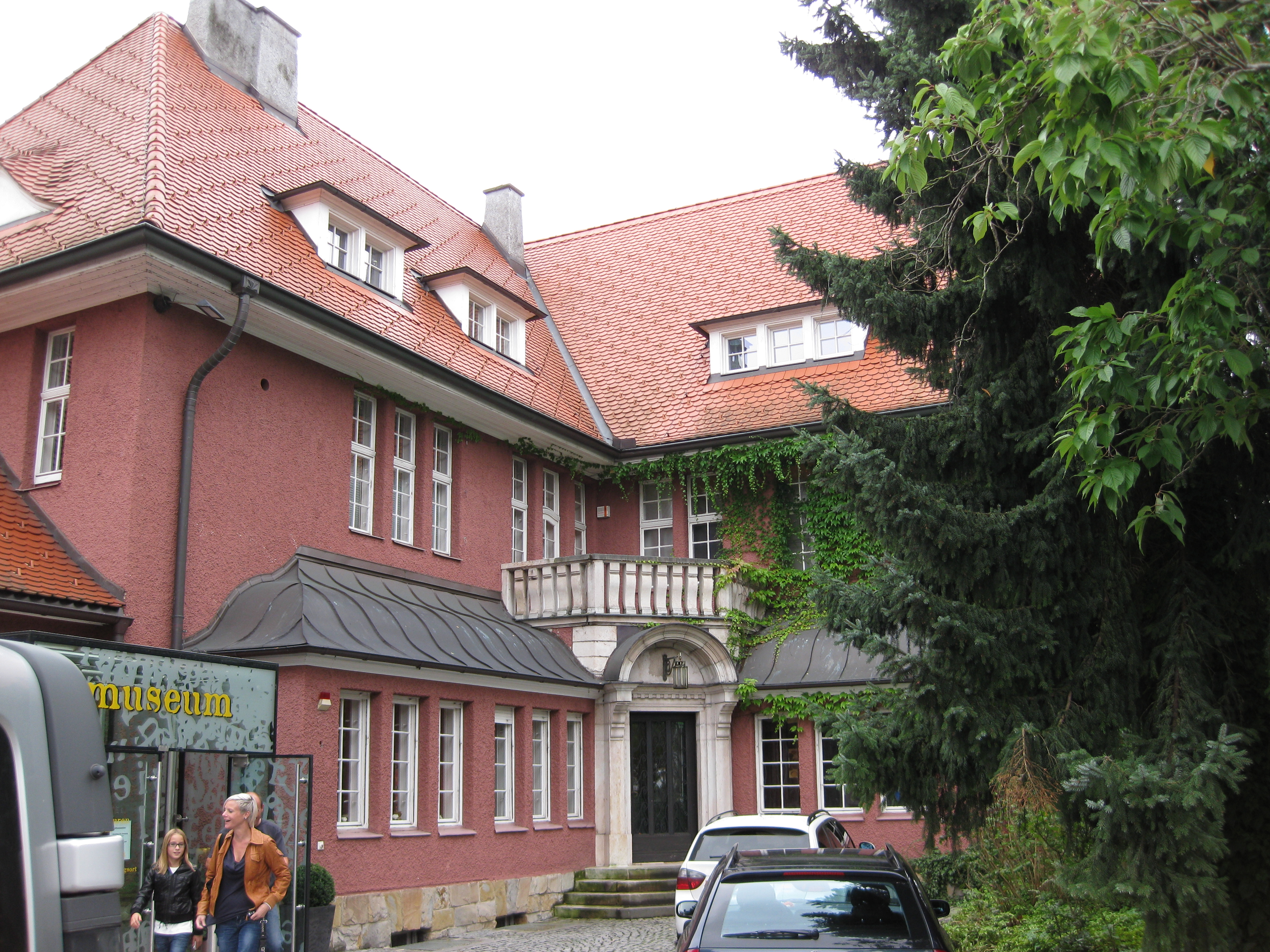 (ehemalige) Villa Ploberger in Wels (Oberösterreich), erbaut 1916 nach Entwurf des Berliner Architekten Hermann Muthesius, unter Denkmalschutz, restauriert und umgenutzt zum privaten Museum für Siegel und Stempel des größten europäischen Stempelherstellers TRODAT